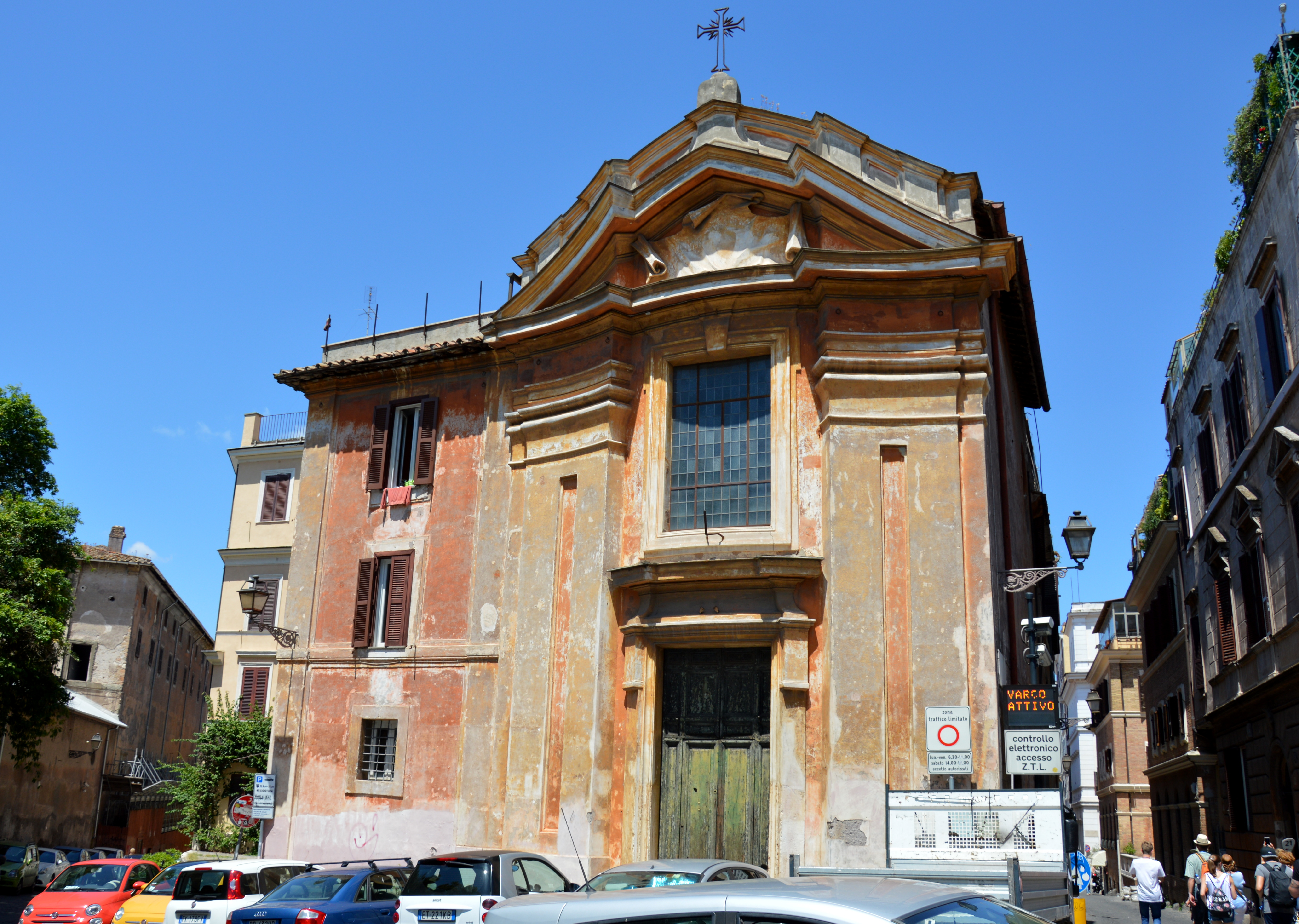 Santa Maria ad nives in Rom